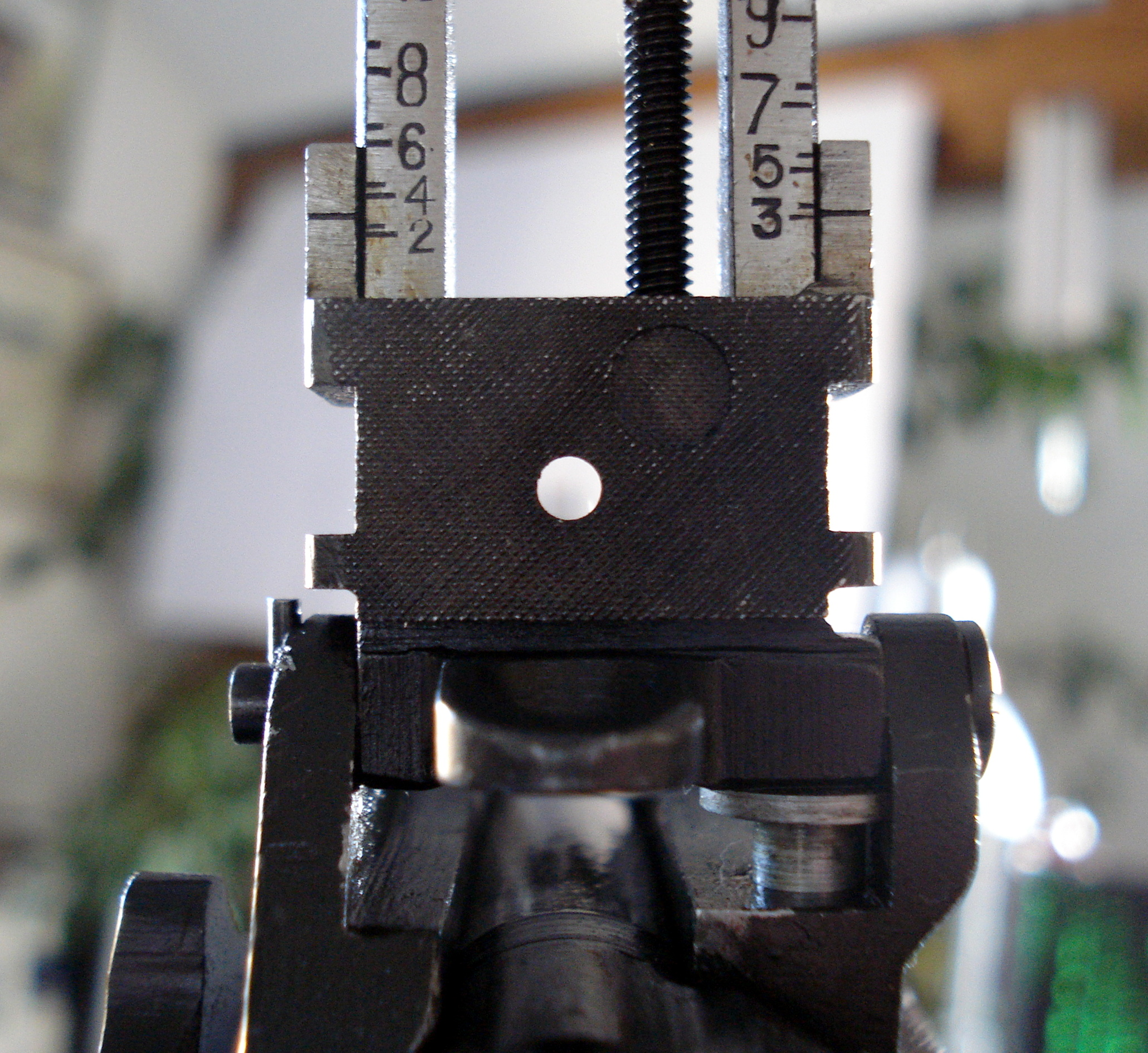 Spindeldiopter des Ordonnanzgewehrs Enfield No4 Mark1 Longbranch